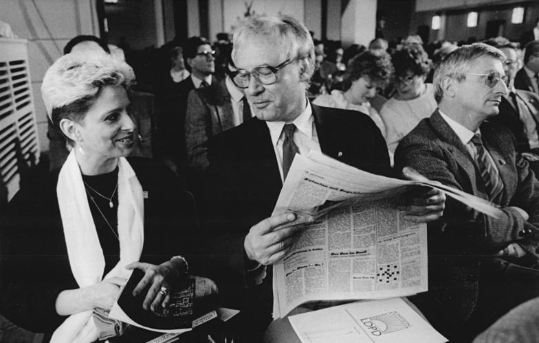 Weimar, 14. LDPD-Parteitag ADN-ZB Hirndorf 10.4.87 Bez. Erfurt: 14. LDPD-Parteitag Zu den über 1000 Delegierten und Gästen des LDPD-Parteitages in Weimar gehören Schlagersängerin Dagmar Frederic, Manfred Haedler, Chefdramaturg an der Deutschen Staatsoper Berlin, und Nationalpreisträger Prof. Dr. sc. med. Hartmut Zippel, Direktor der Klinik und Poliklinik für Orthopädie der Charite Berlin. (v.l.) Abgebildete Personen: Frederic, Dagmar: Schlagersängerin, DDR Zippel, Hartmut Prof. Dr.: Direktor der Klinik und Poliklinik für Orthopädie der Charité Berlin, DDR